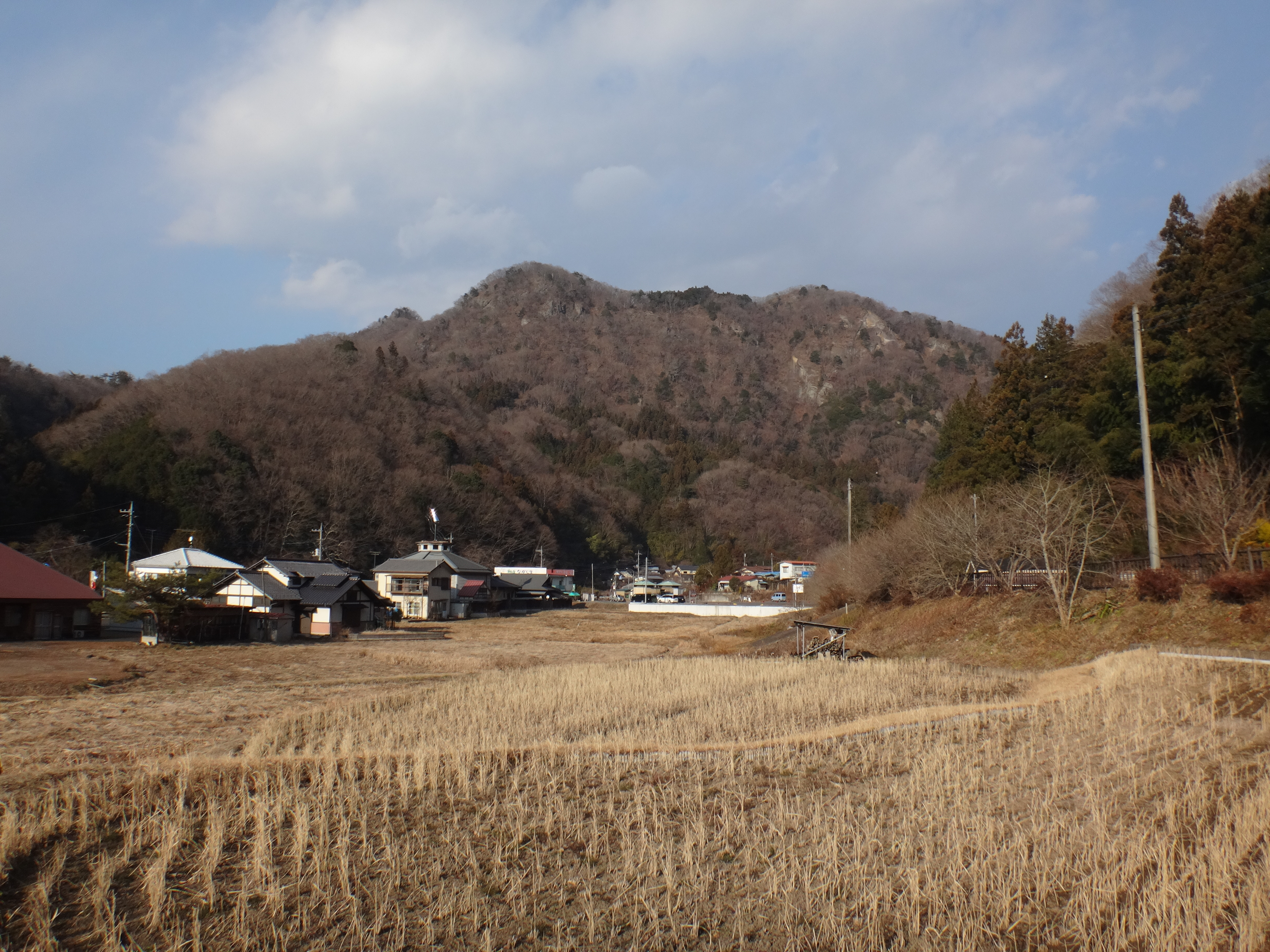 麓から見た生瀬富士